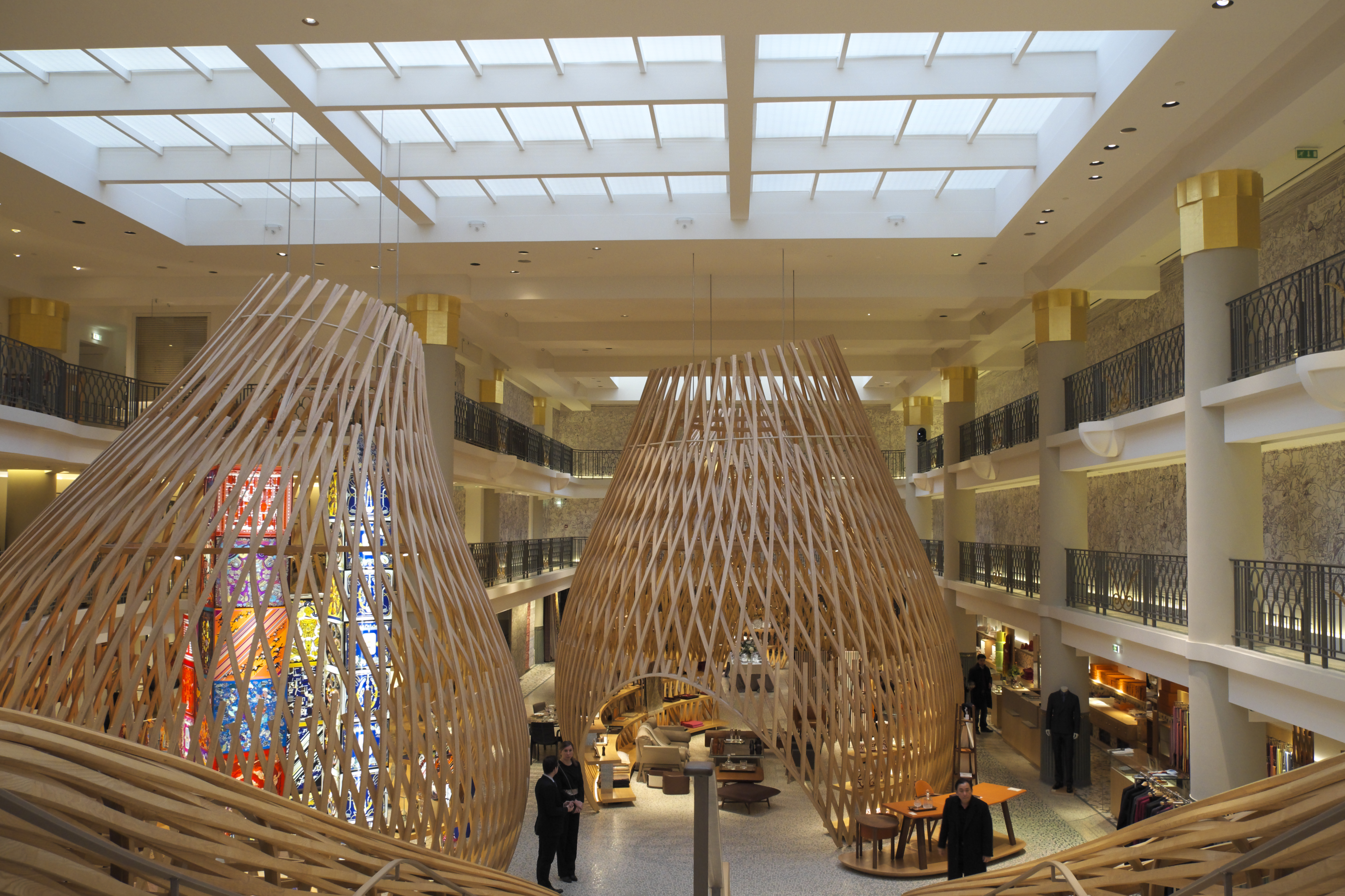 Ehemaliges Schwimmbad (Piscine Lutetia), 17, rue de Sèvres im 6. Arrondissement von Paris, 1935 von dem Architekten Lucien Béguet gebaut, seit 2010 Verkaufsraum von Hermès